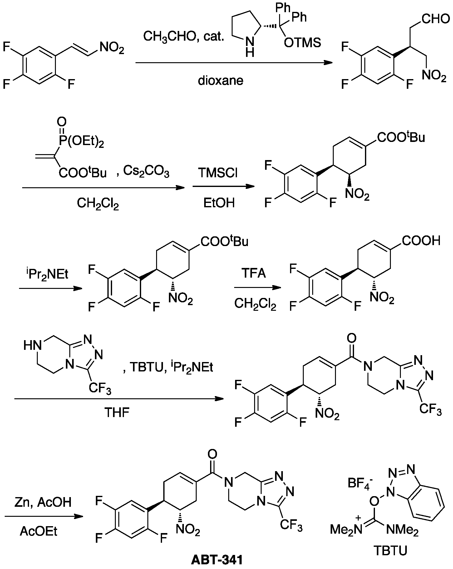 ChemDrawで作成